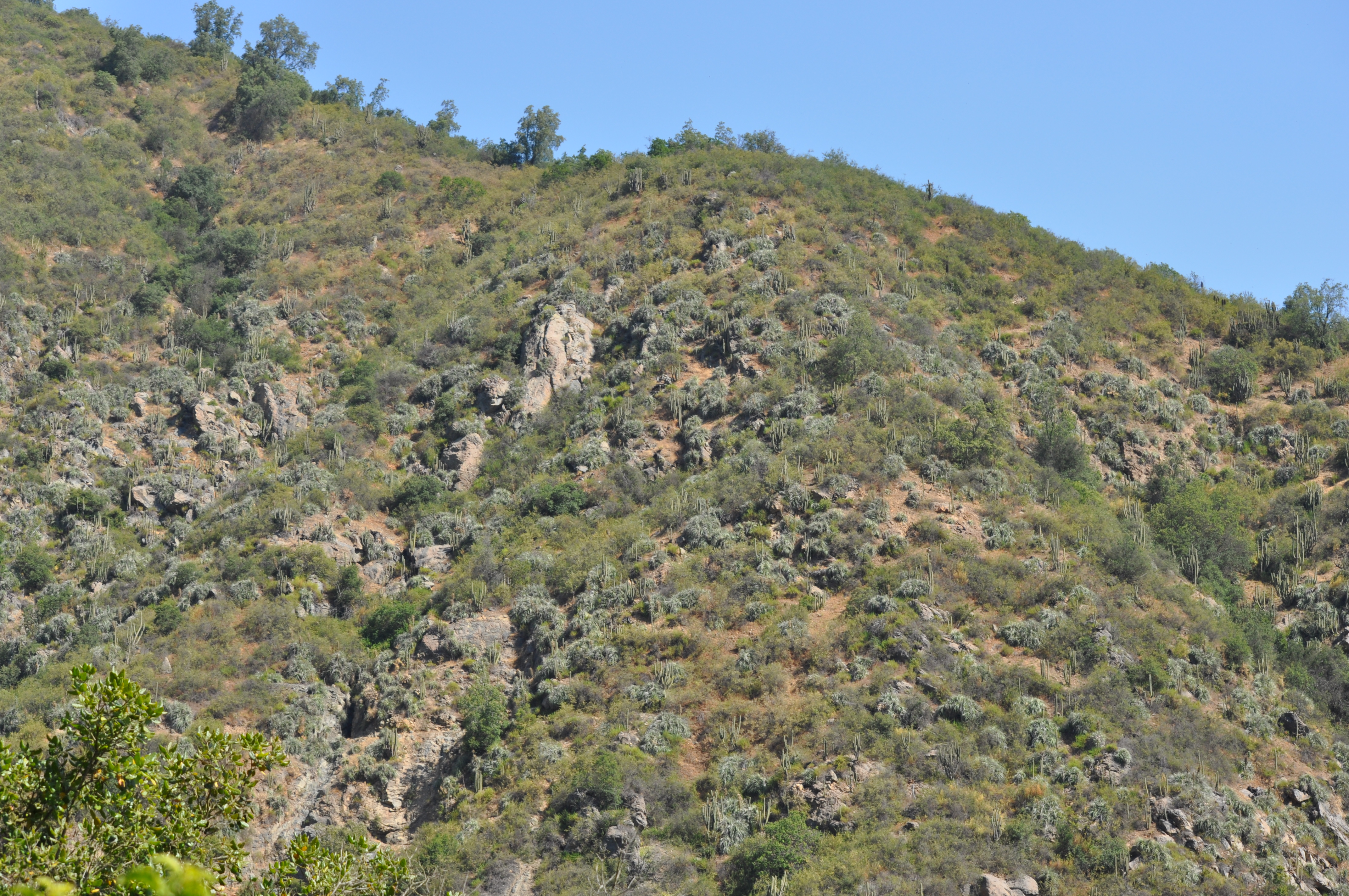 Matorral espinoso de chagual (distintas especies del género Puya) y quisco (Echinopsis chiloensis) en el parque nacional La campana, en una ladera orientada hacia el norte. Foto tomada desde el mirador Otto Zöllner.